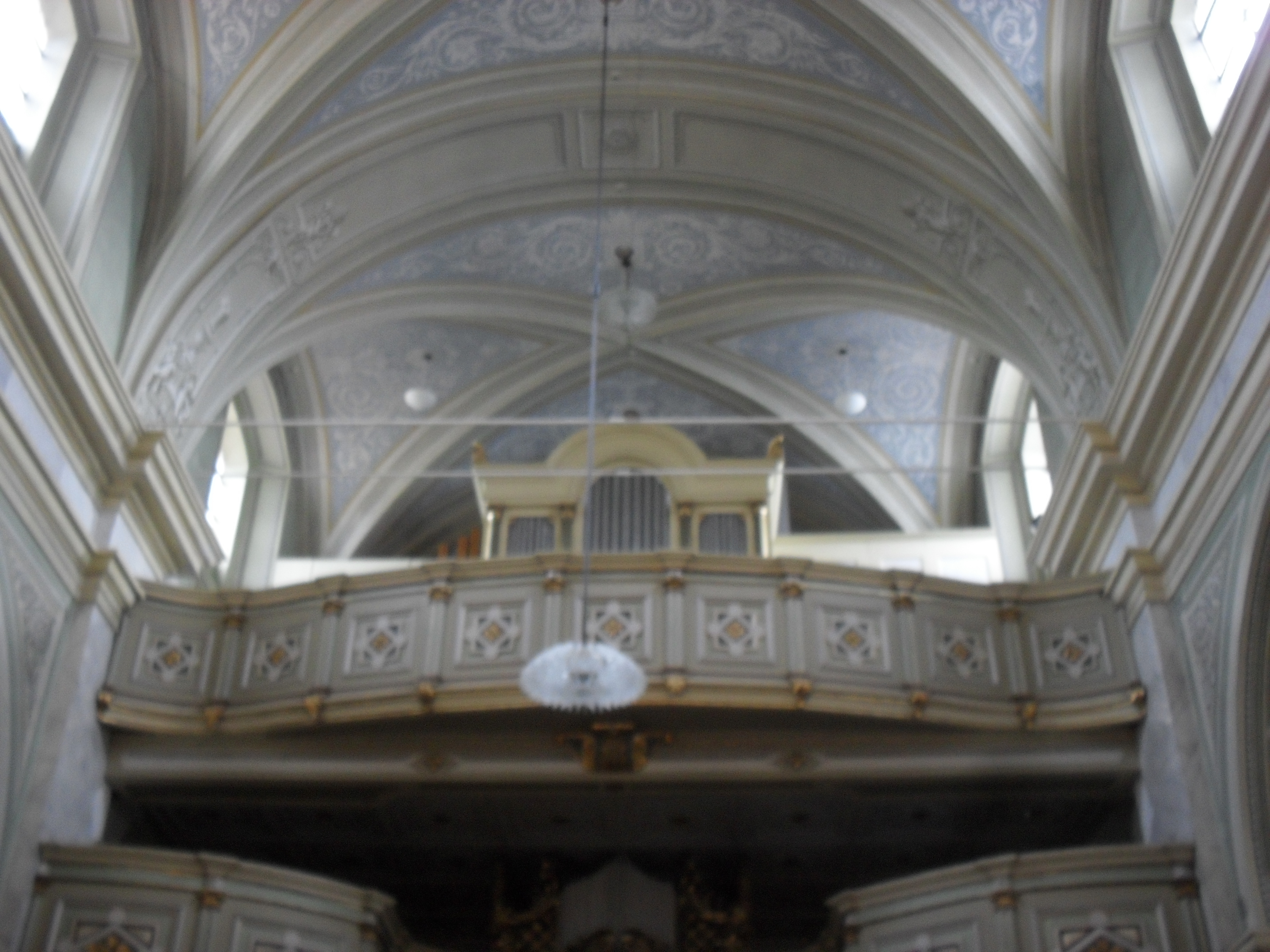 Teplický kostel svatého Jana Křtitele.